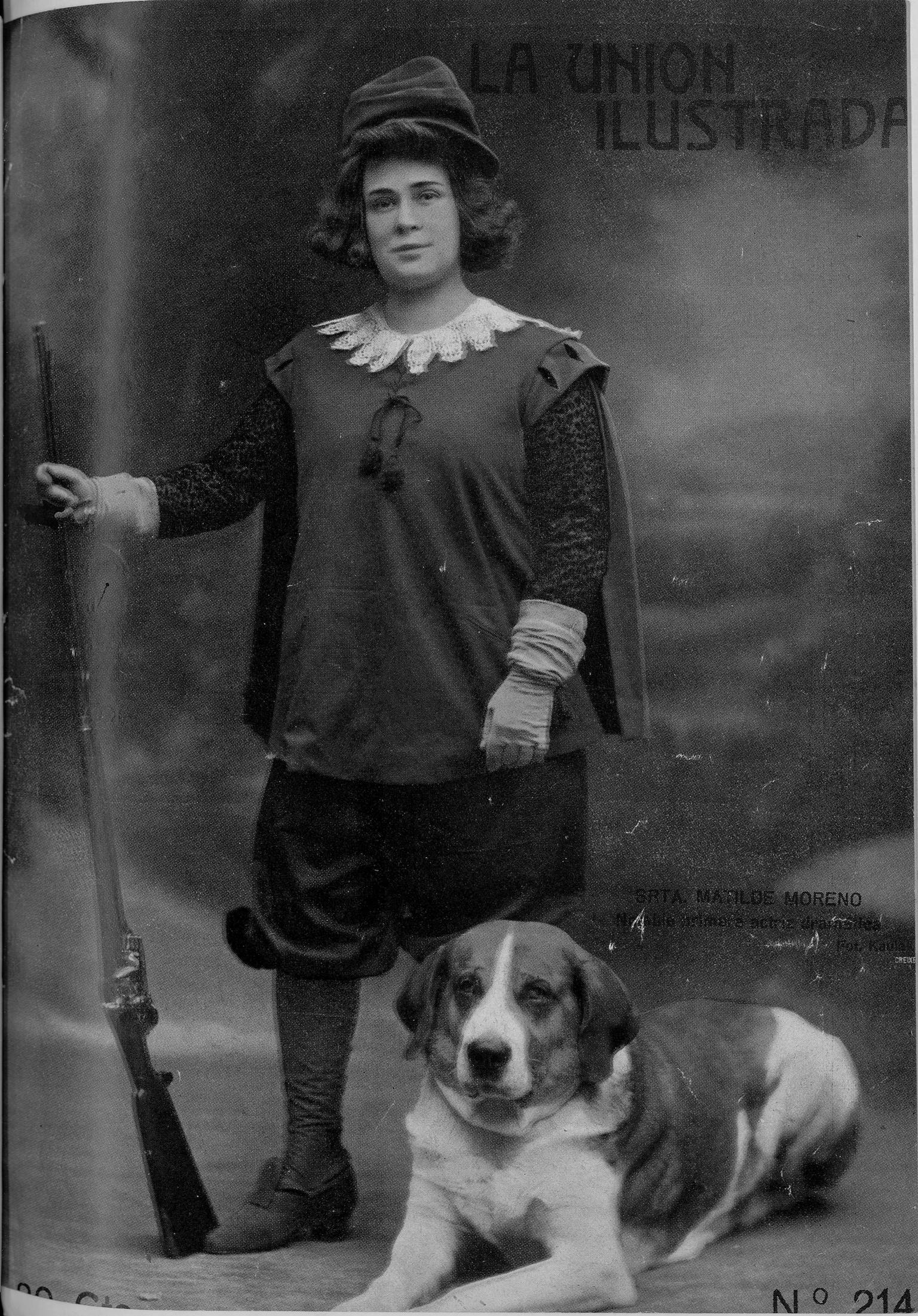 Portada de La Unión Ilustrada.